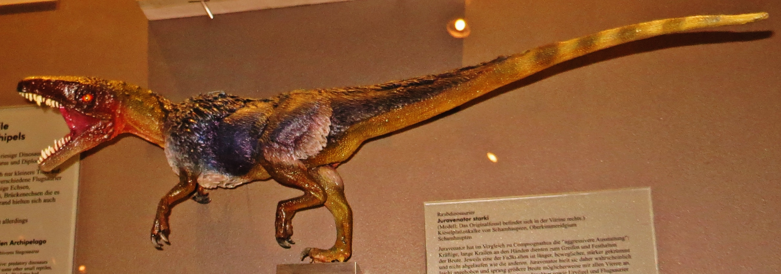 Took the picture at Jura-Museum, Eichstaett